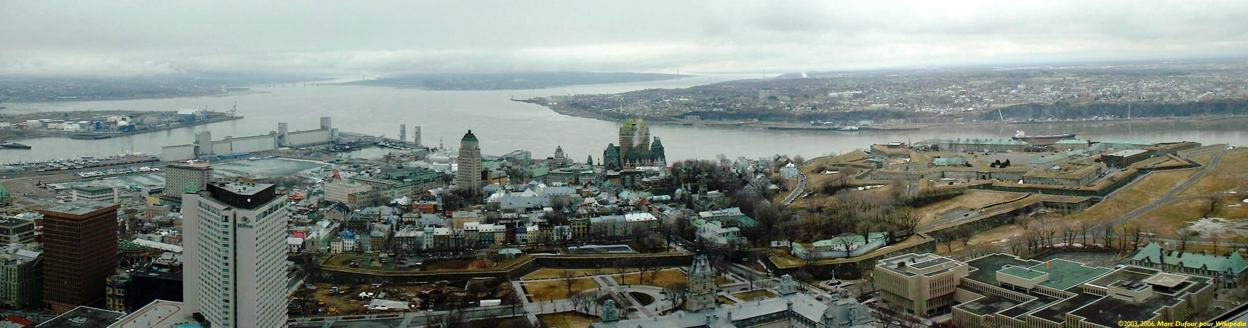 View of the old Québec walled city (taken from Tour G). Orleans is visible at the center in the middle of the St-Lawrence River. The Price Building and Château Frontenac tower above the old city. On the right is the Citadel, home of the Royal 22 regiment. Vue du vieux Québec intra-muros (prise de la Tour G). L’Île d’Orléans au milieu du Fleuve Saint-Laurent est visible au centre. L’édifice Price et le Château Frontenac dominent la vieille ville. Sur la droite se trouve la Citadelle, base du régiment Royal 22ème.